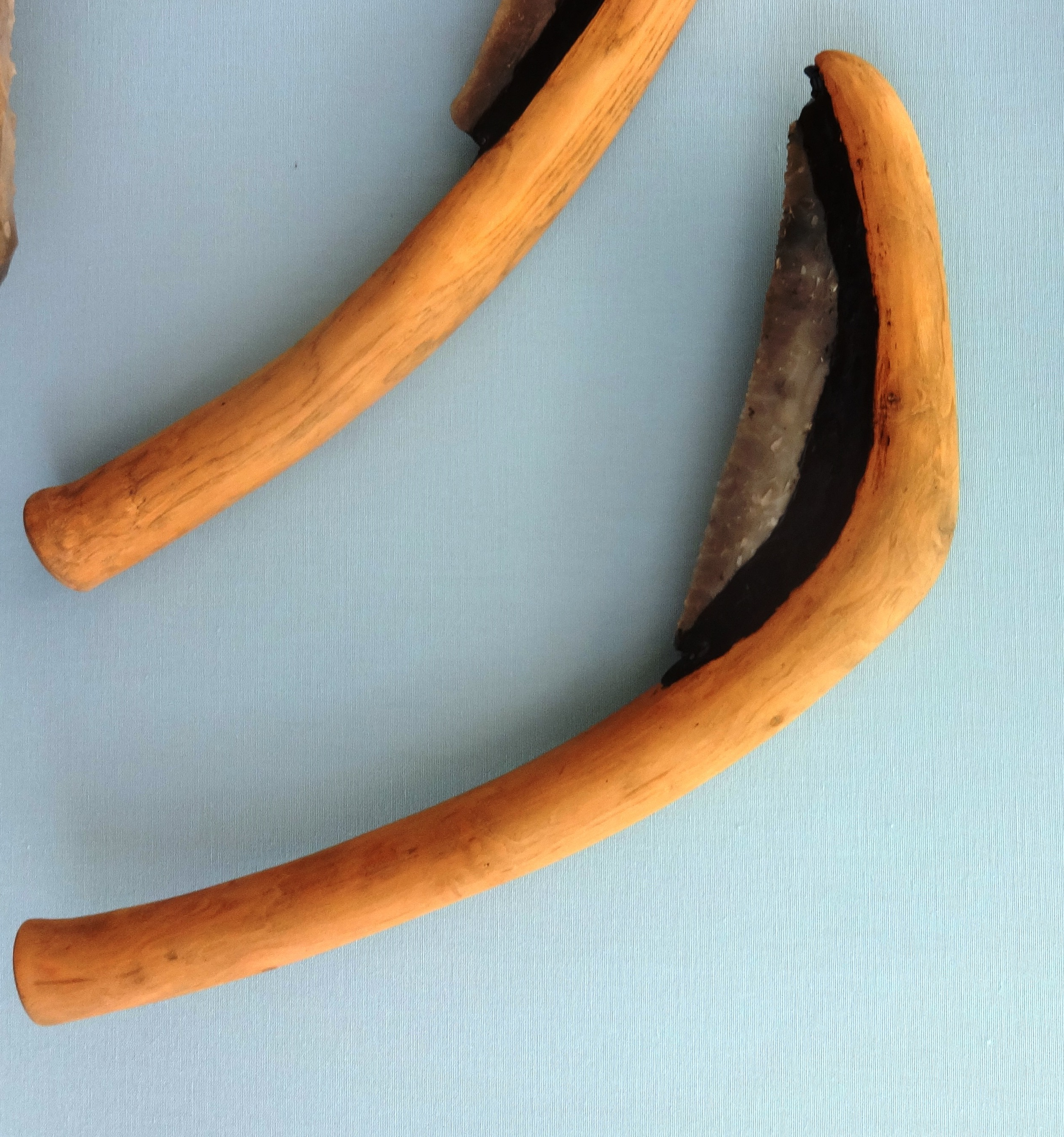 neolithische Sichel, Rekonstruktion, Kreismuseum Plön